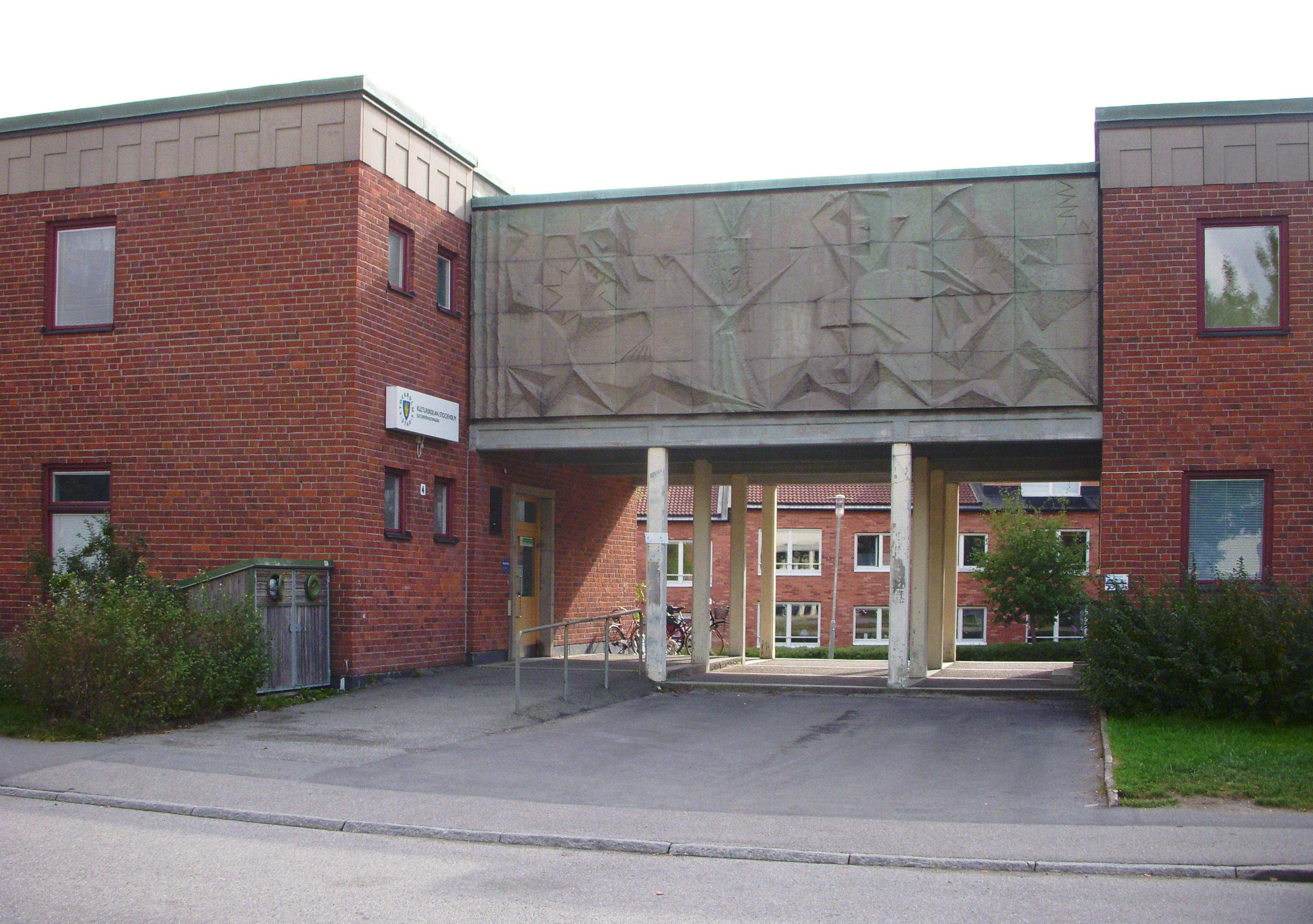 Medborgarhuset, Hägerstensåsen, arkitekt Ancker Gate Lindegren